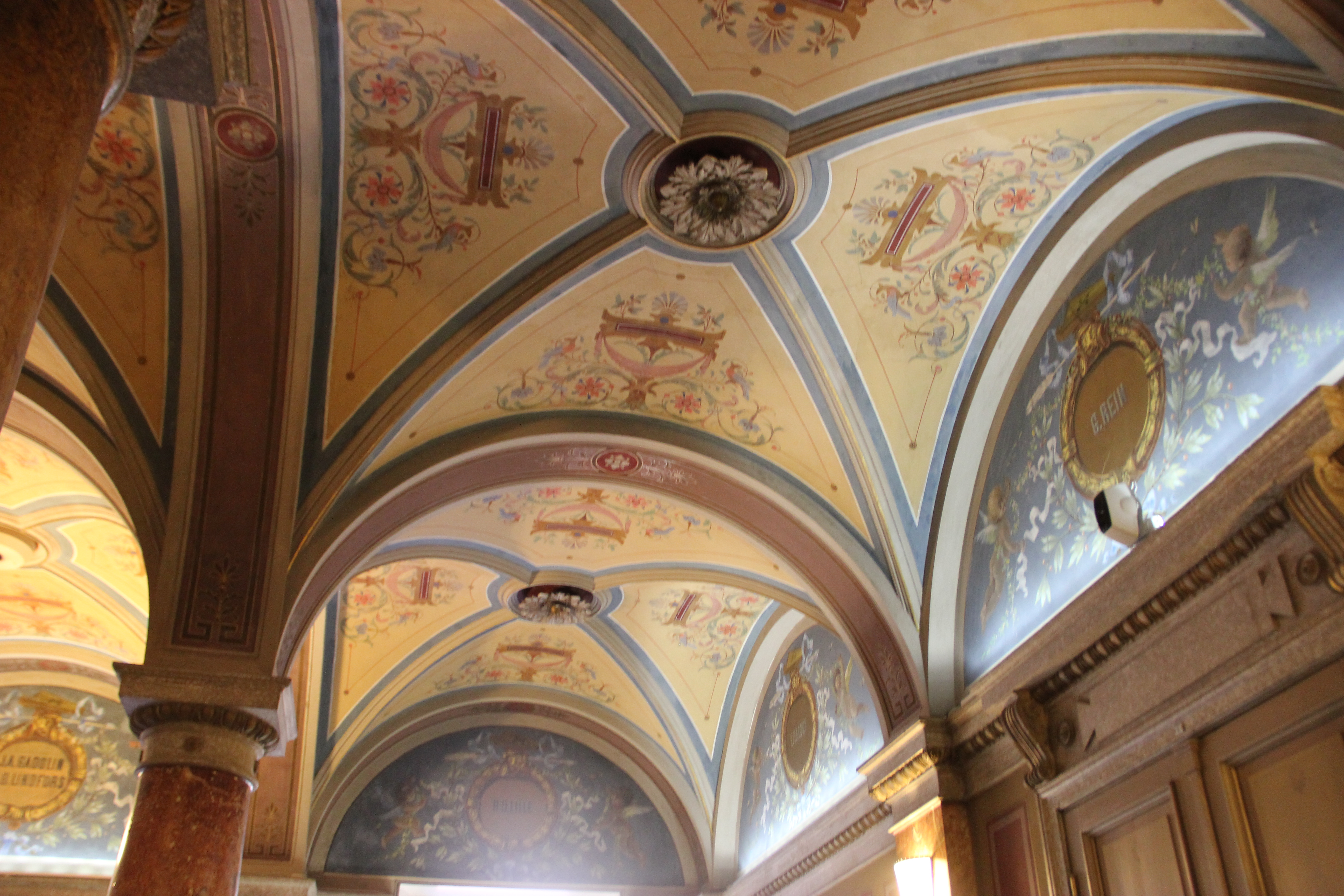 Suomalaisen Kirjallisuuden Seura, sisääntuloaulan katto